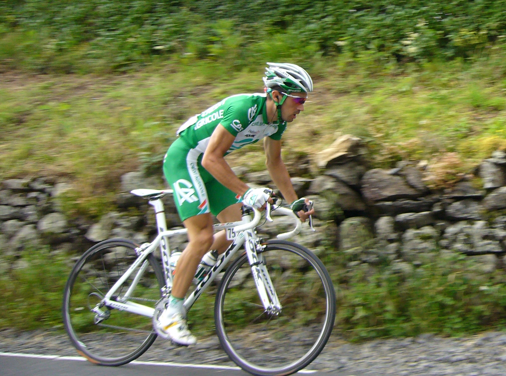 Le coureur cycliste français Christophe Le Mevel (Crédit Agricole) lors des championnat de France sur route 2007 à Aurillac (Cantal) French cyclist from Crédit Agricole, Christophe Le Mevel during the 2007 french national championship (Aurillac, Cantal)